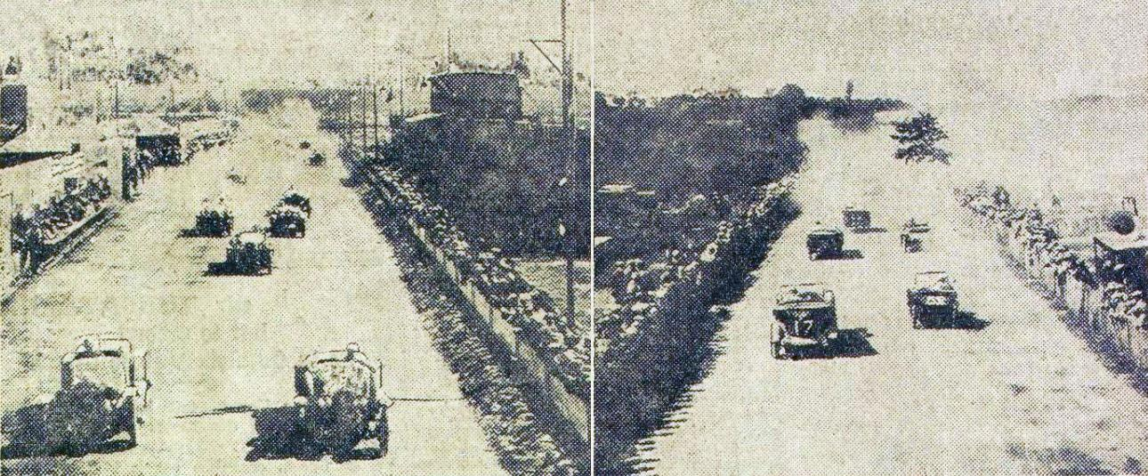 Le départ des 24 Heures du Mans 1924, de face, et de dos.